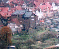 Graumühle